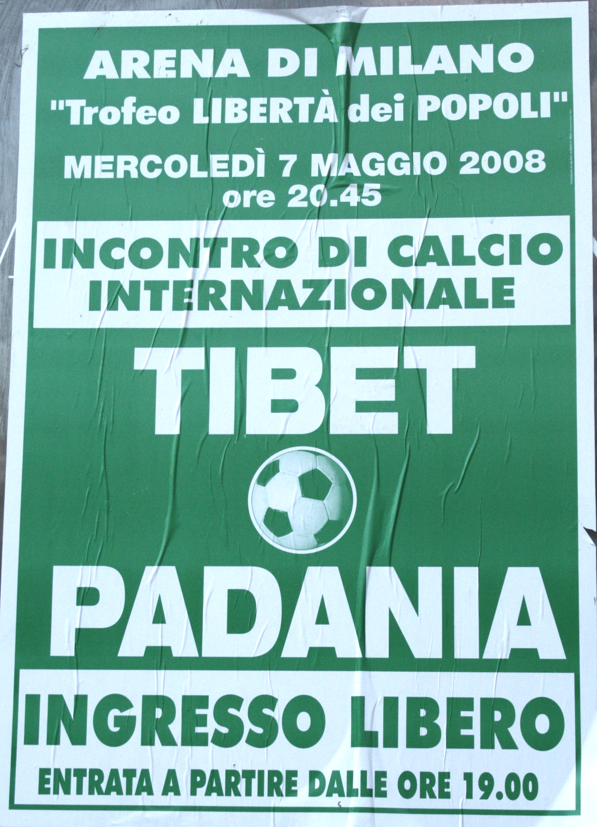 Manifesto che promuove l'incontro di calcio internazionale tra Padania e Tibet per il trofeo "Libertà dei popoli".